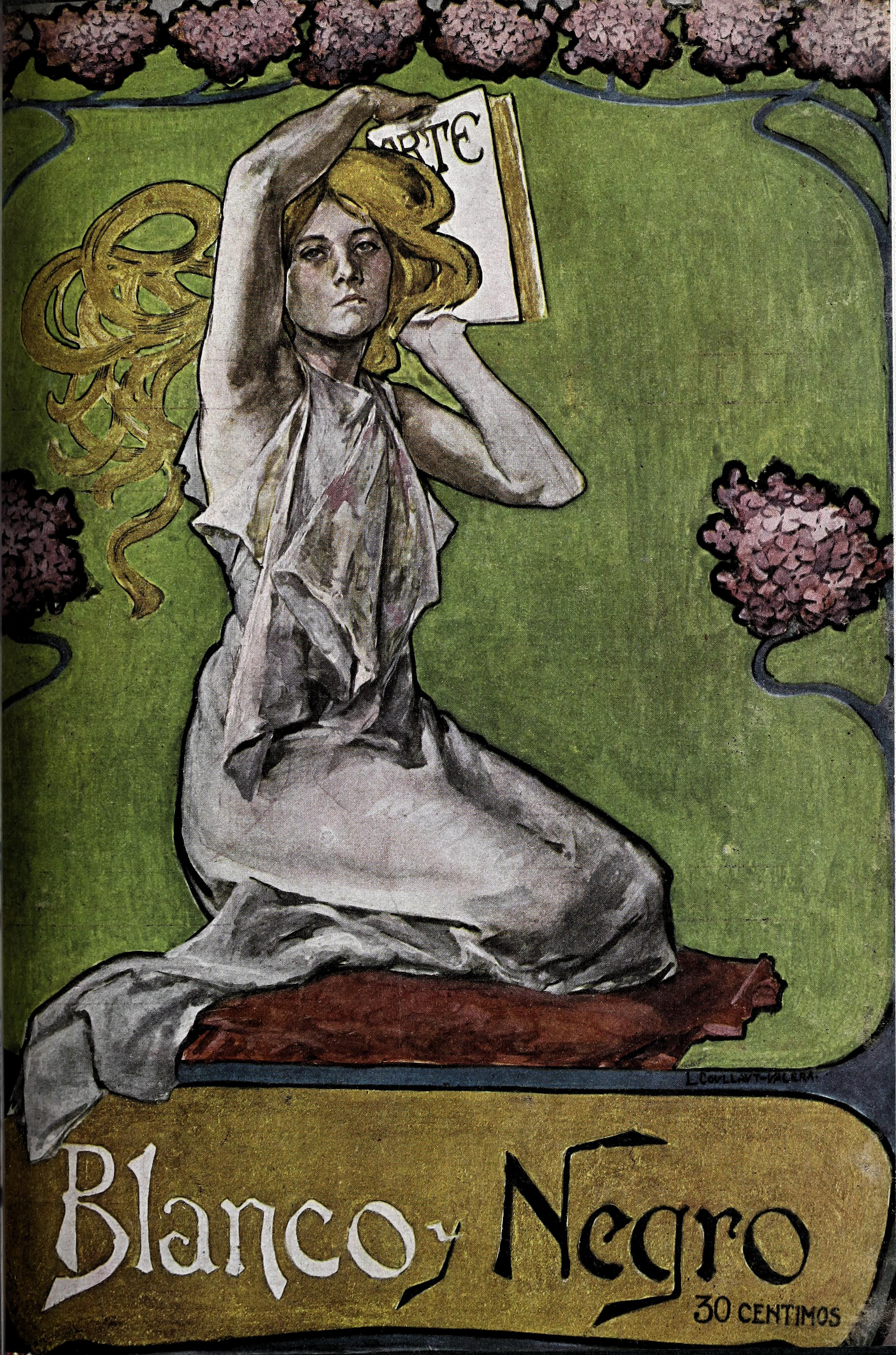 Portada de Lorenzo Coullaut Valera.